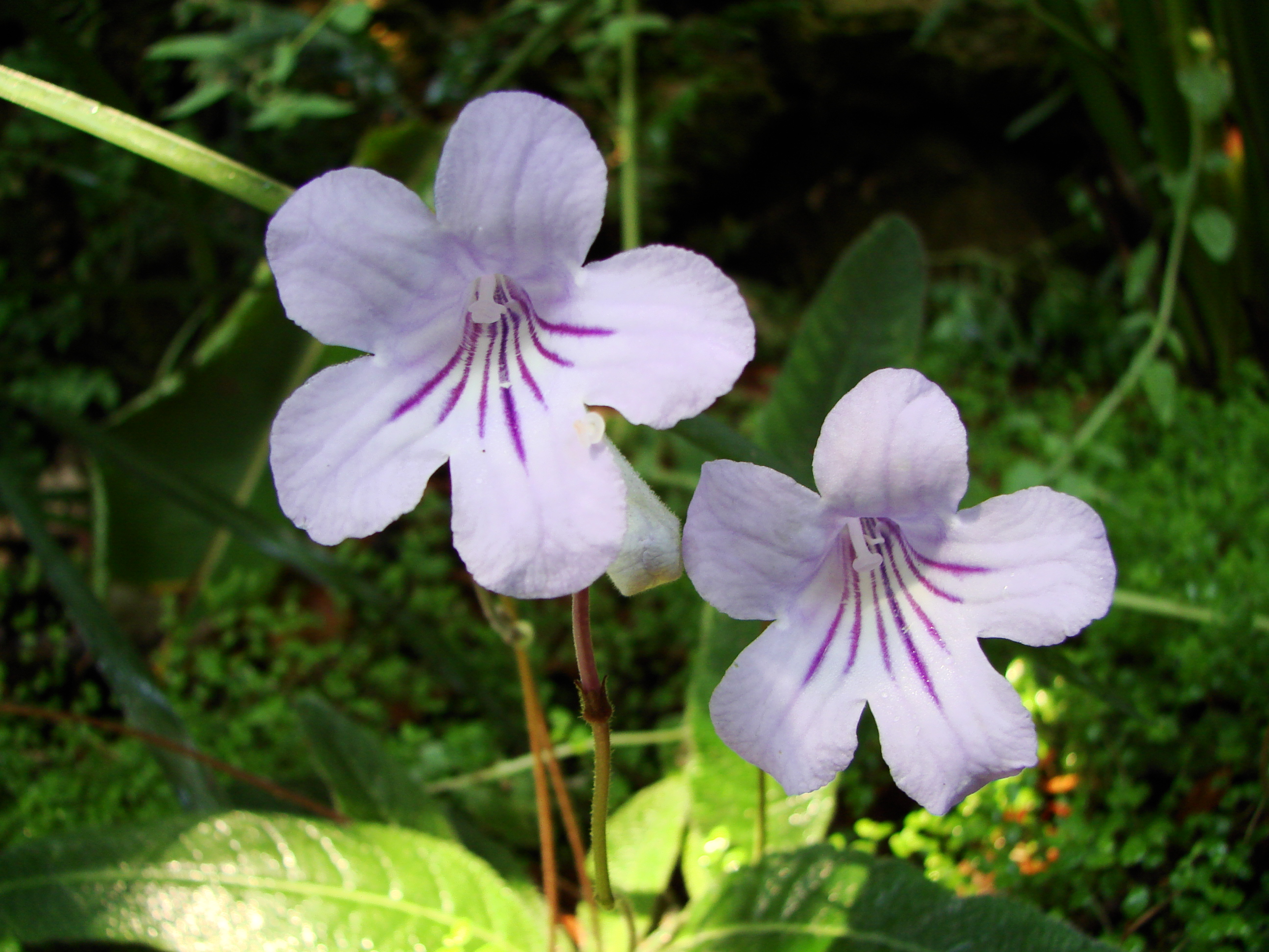 Jardin botanique de l'Université de Zurich (Suisse) : Streptocarpus gardenii Hook.